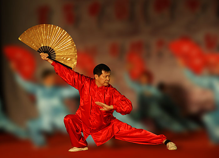 功夫扇